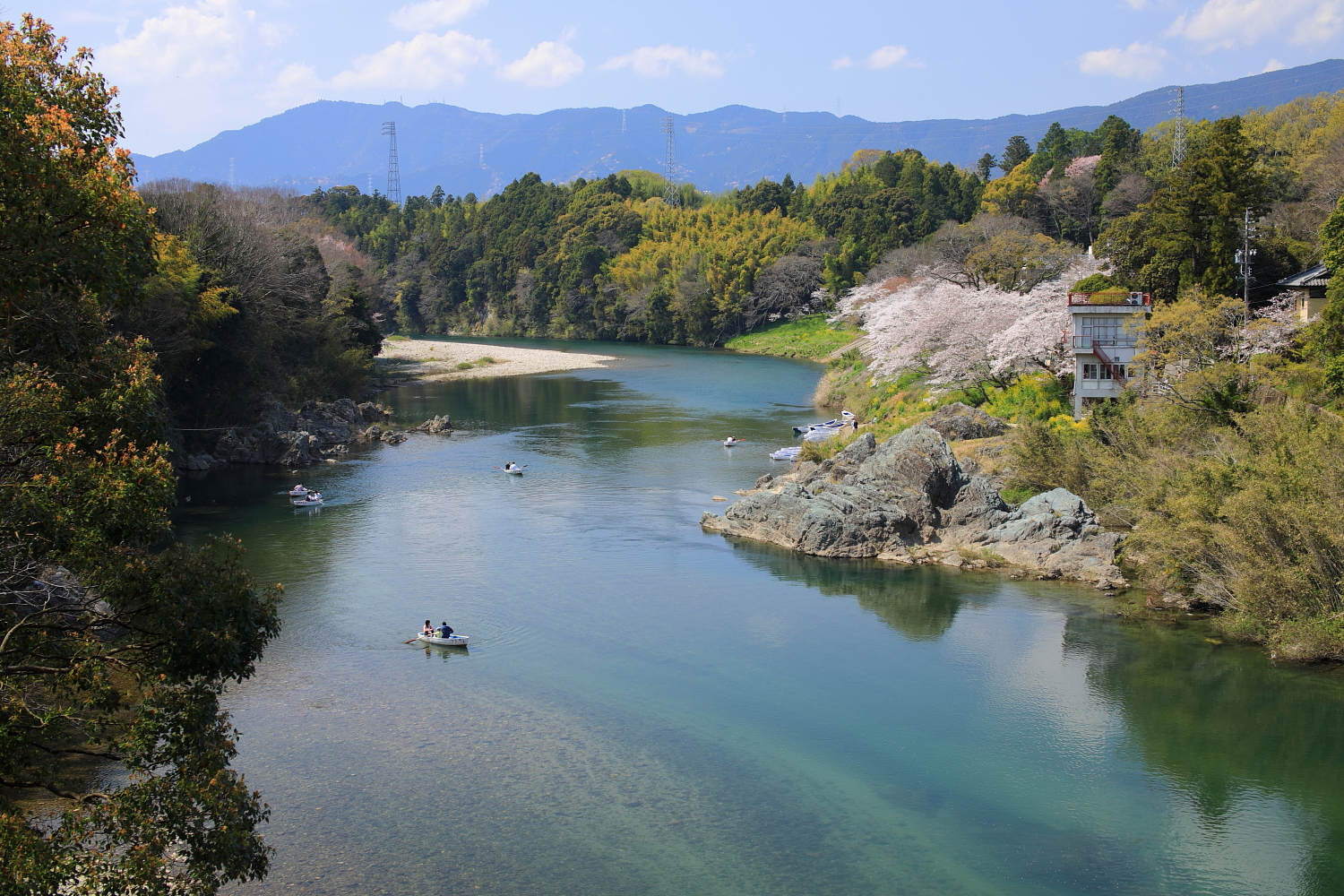 豊川（新城市庭野、2019年（平成31年）4月）